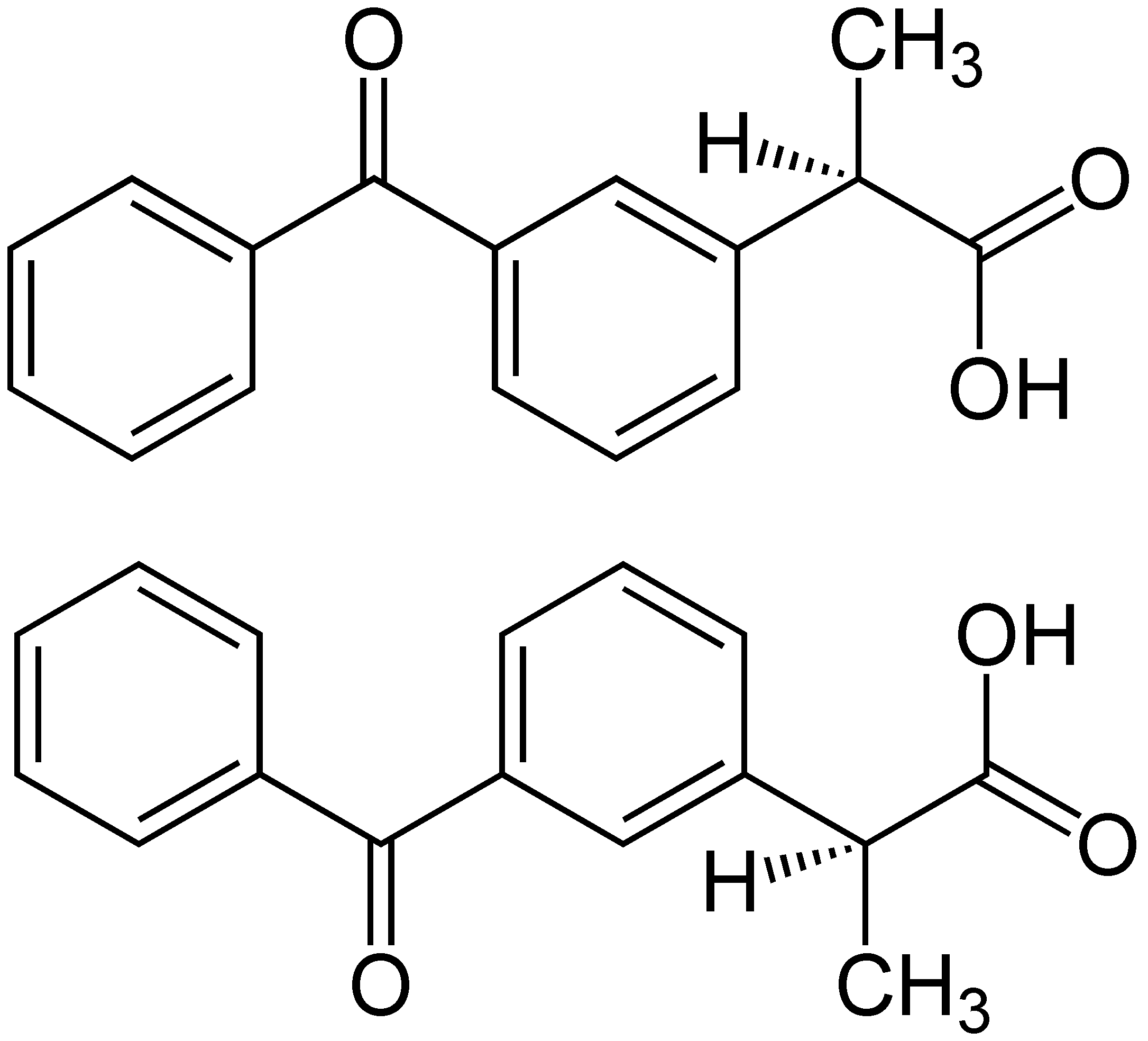 Ketoprofen-Enantiomere (Strukturformeln) = Racemat